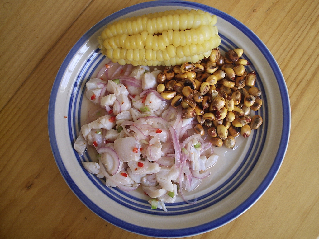 "Ceviche"- narodne jedlo. rybka sa nakraja na male kusky prida sa citron-poriadne mnozstvo, cibula, cerv. parika... a necha sa postat v chladnicke 20 min. podava sa s kukuricou + cancha robi sa podobne ako popcorn. je to oprazena kukurica ale nejaky specialny druh kukurice. je to fakt super!